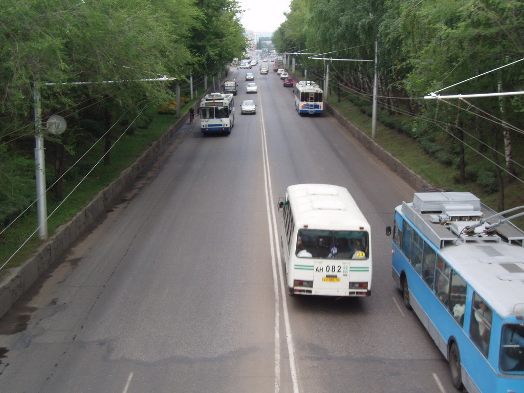 Фото с ж/д моста, Стерлитамак